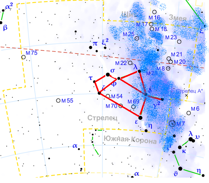 Сделано с помощью графического редактора Paint